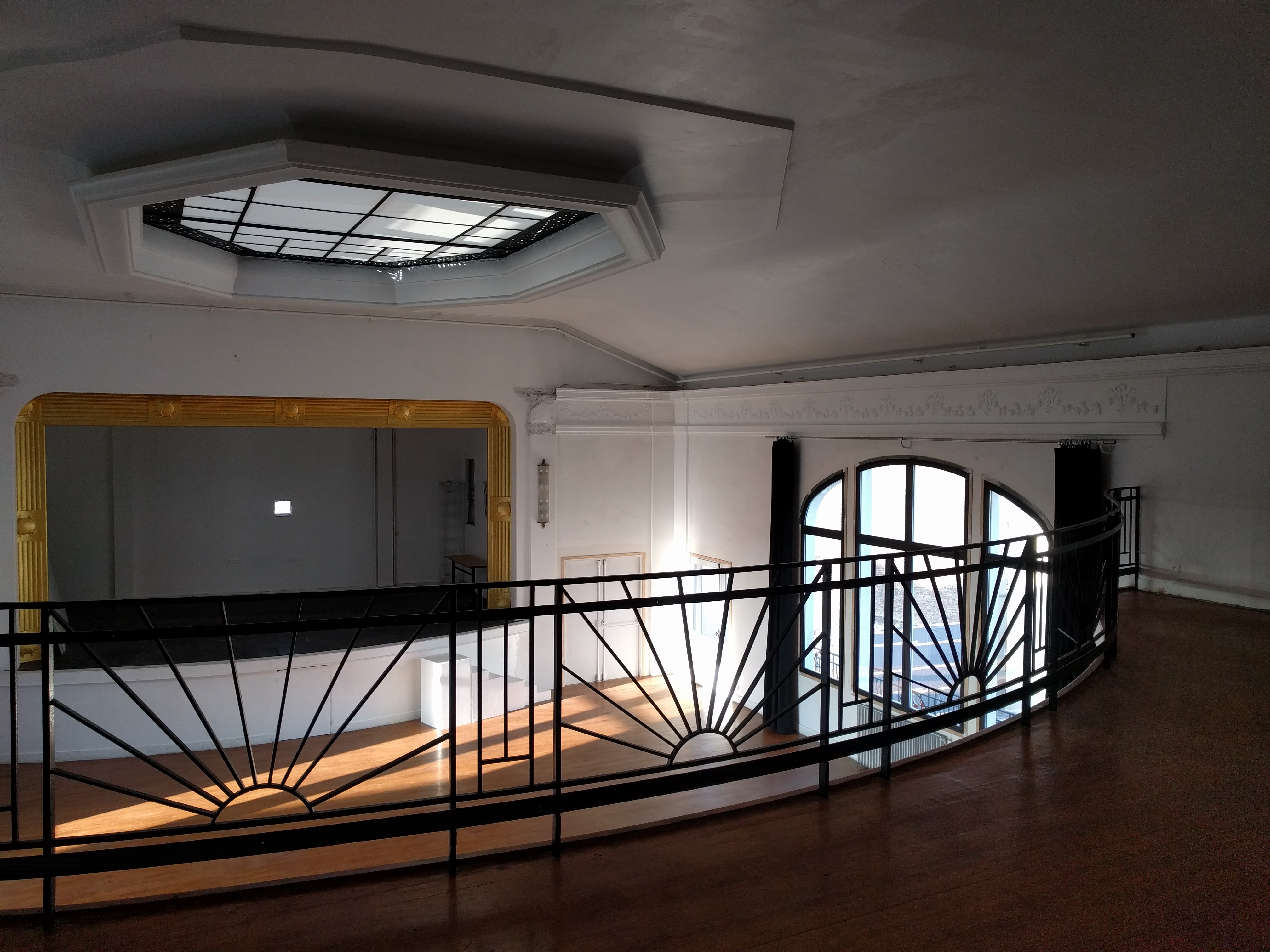 Le Solaris aujourd'hui. Vue de la scène depuis la mezzanine. Ancienne Salle Lénine rénovée en 2018